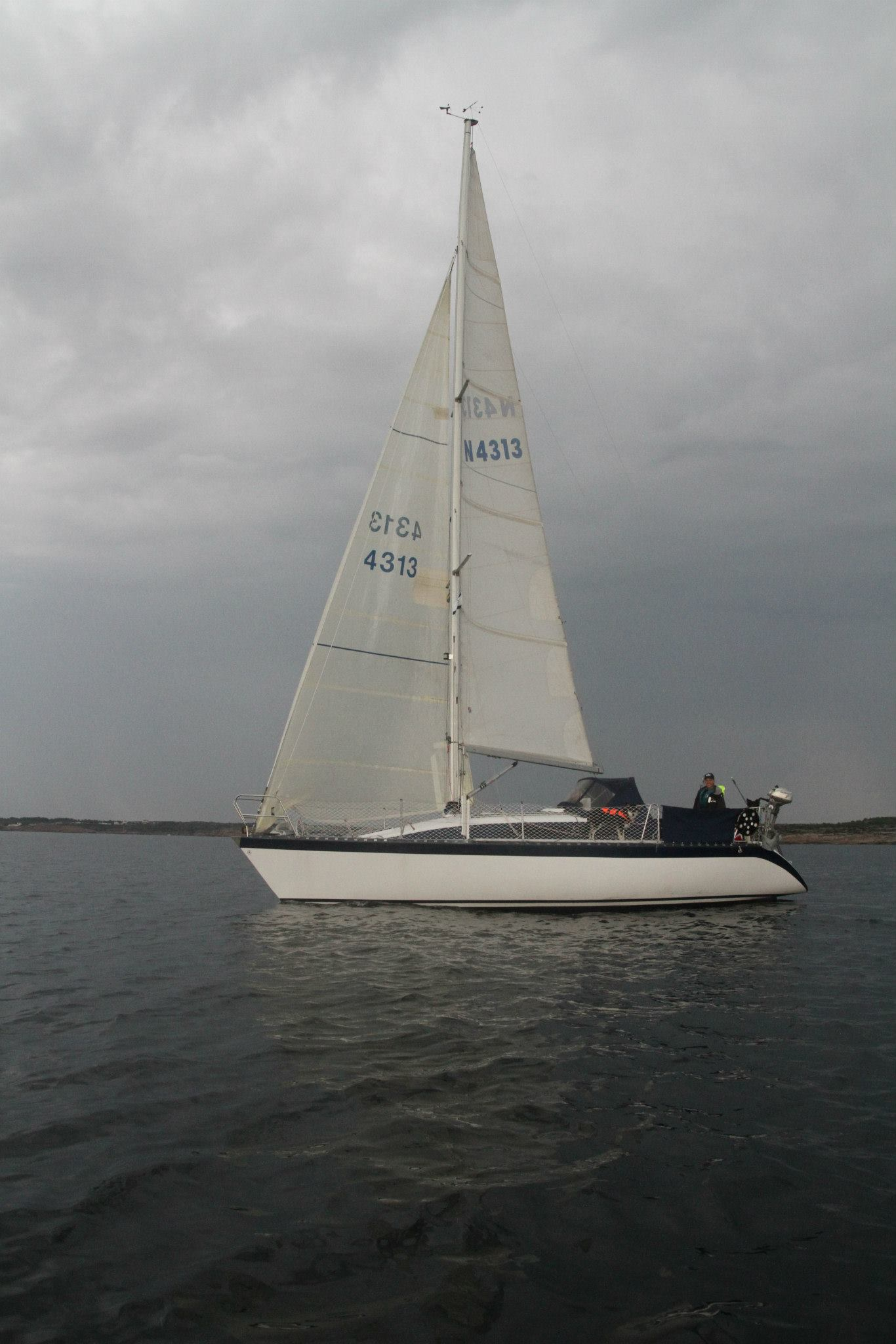 Nessy 94 CR